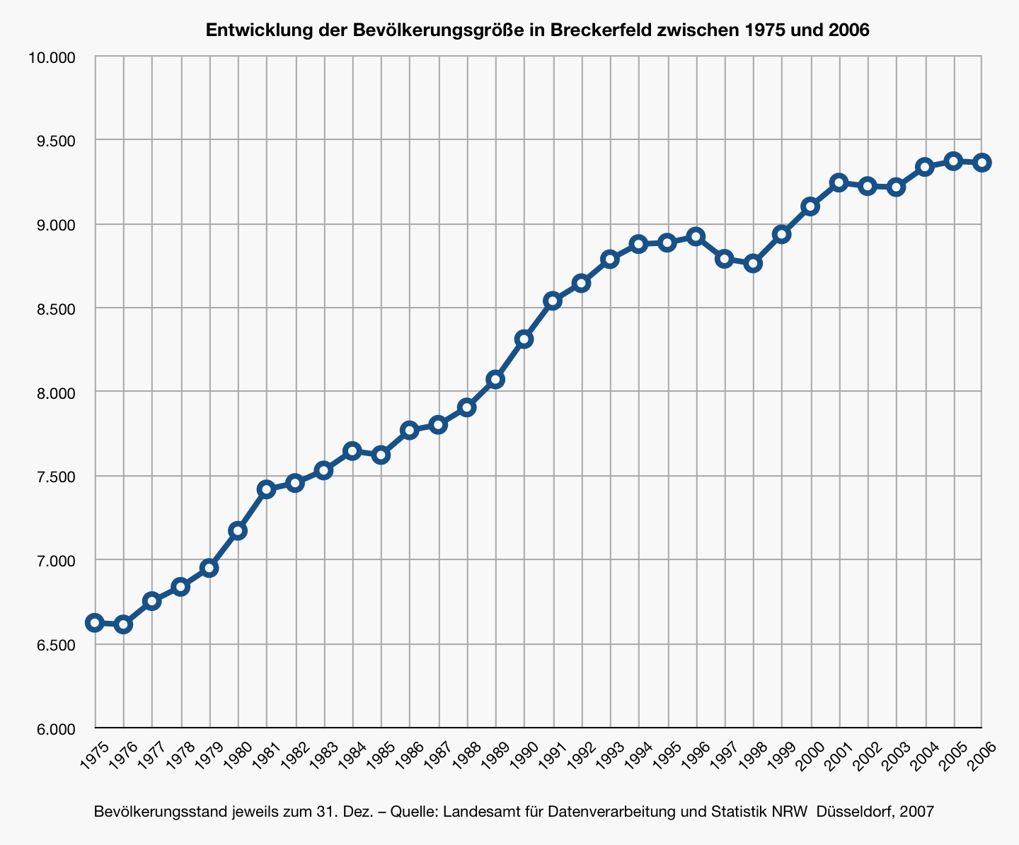 Entwicklung der Einwohnerzahl in Breckerfeld zwischen 1975 und 2006